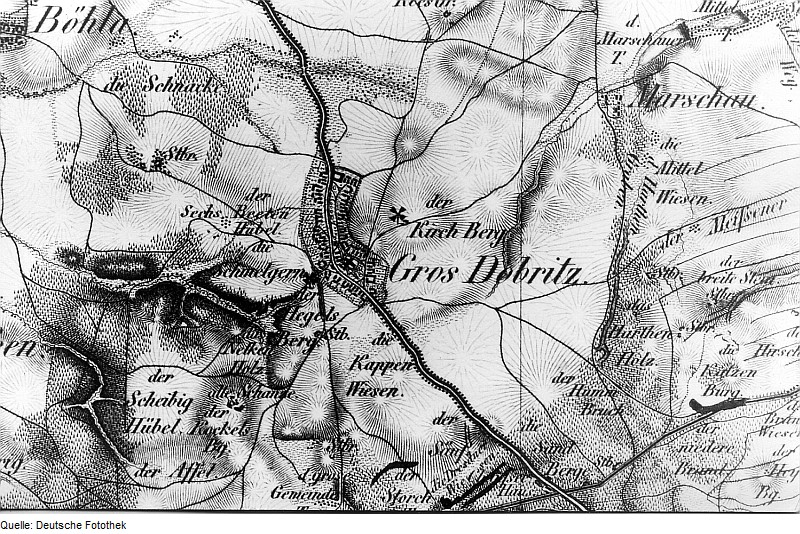 Original image description from the Deutsche Fotothek Niederau-Großdobritz. Oberreit, Sect. Großenhain, 1841/43